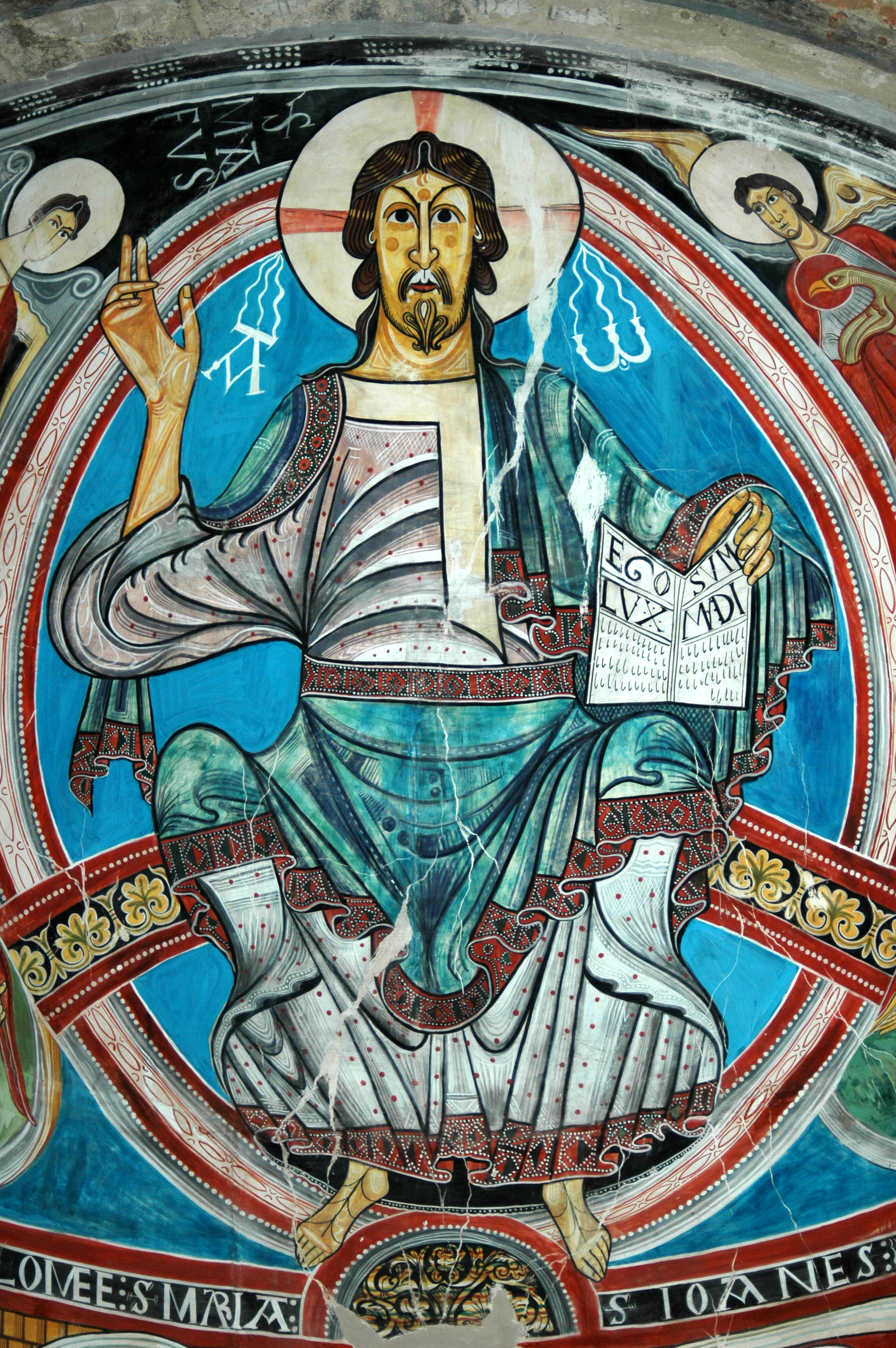 Església de Sant Climent de Taüll (la Vall de Boí)